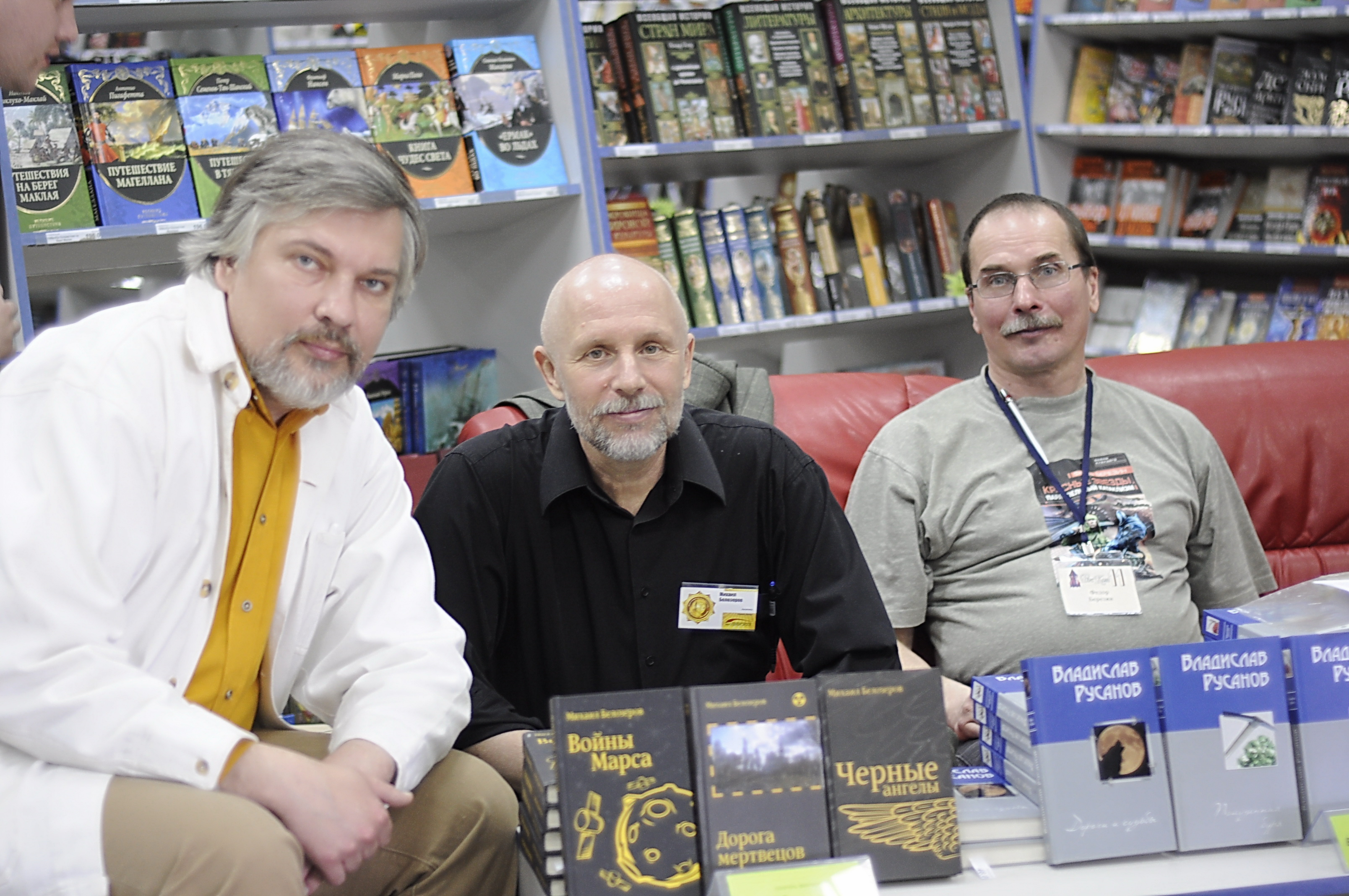 Донецк. Встреча с донецкими писателями-фантастами и афтограф-сессия.